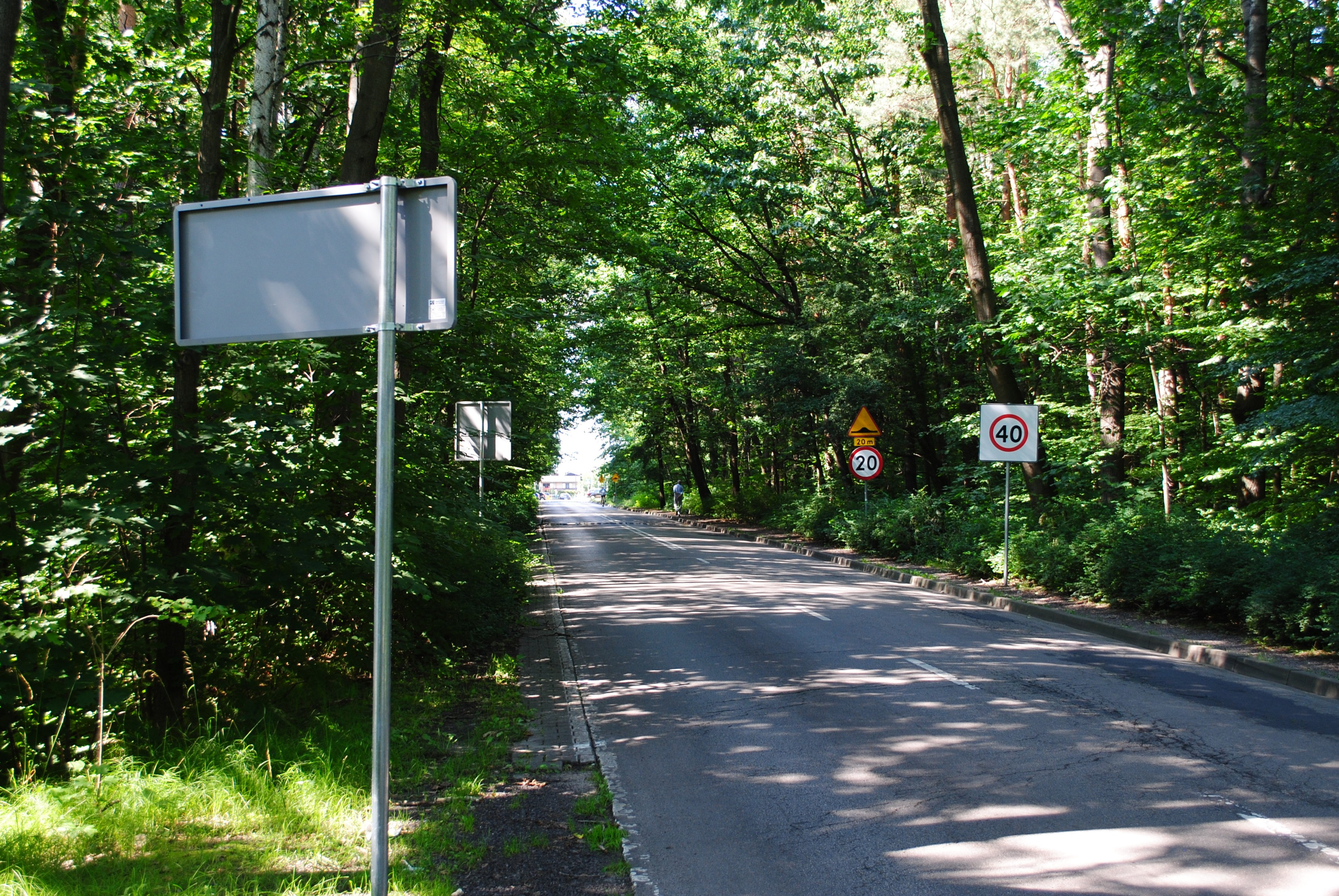 Katowice-Giszowiec. Ulica Adama